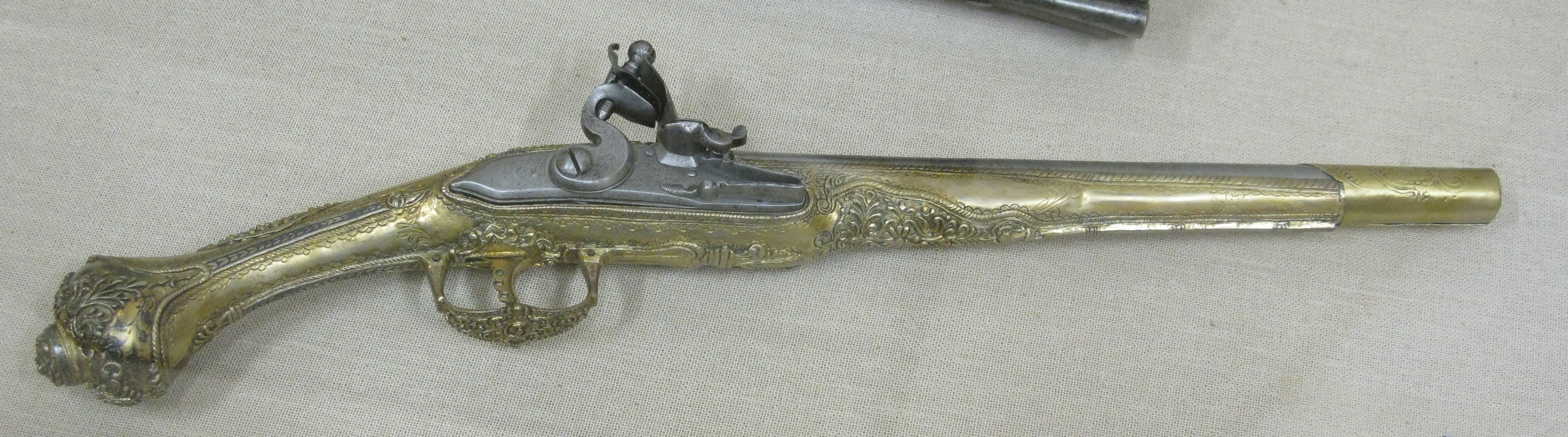 National Historical Museum, Athens, Greece --- Όπλα Ιωάννη Μακρυγιάννη. Εθνικό Ιστορικό Μουσείο. Αθήνα.